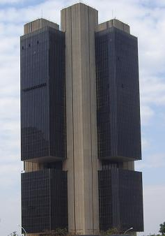 Edifício sede do Banco Central do Brasil em Brasília, foto de Antônio Mariz